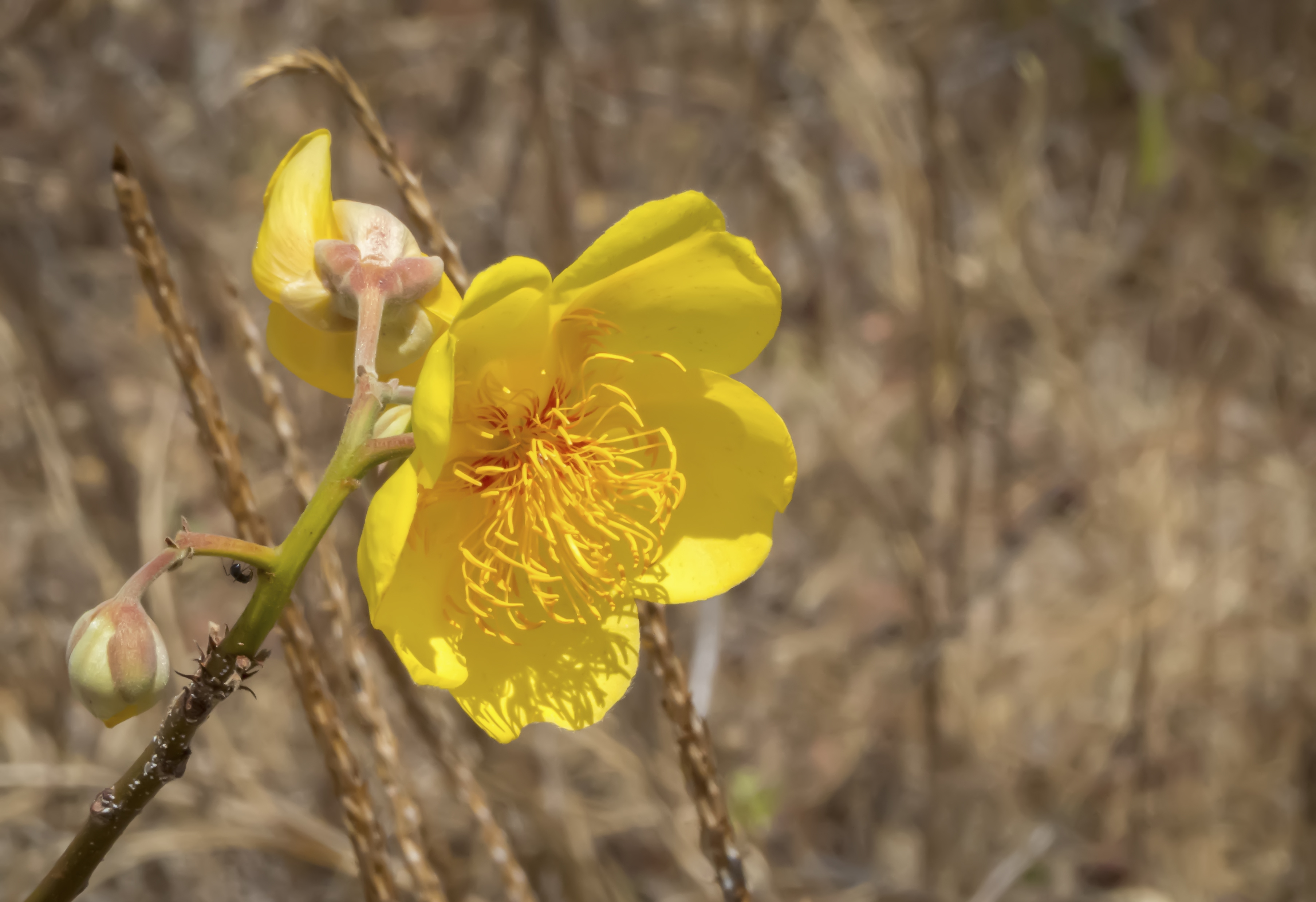 Cochlospermum, Parque Botânico de Caucaia no Ceará, Brasil